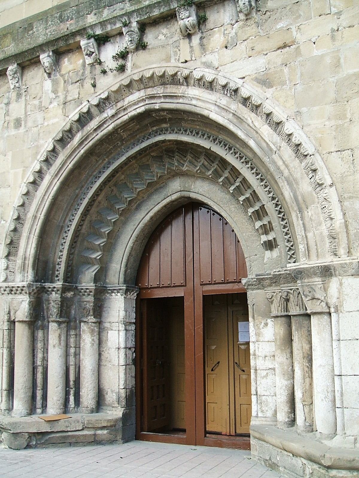 Portada tardorrománica de la Iglesia del Espíritu Santo, Miranda de Ebro, Burgos, España/Spain